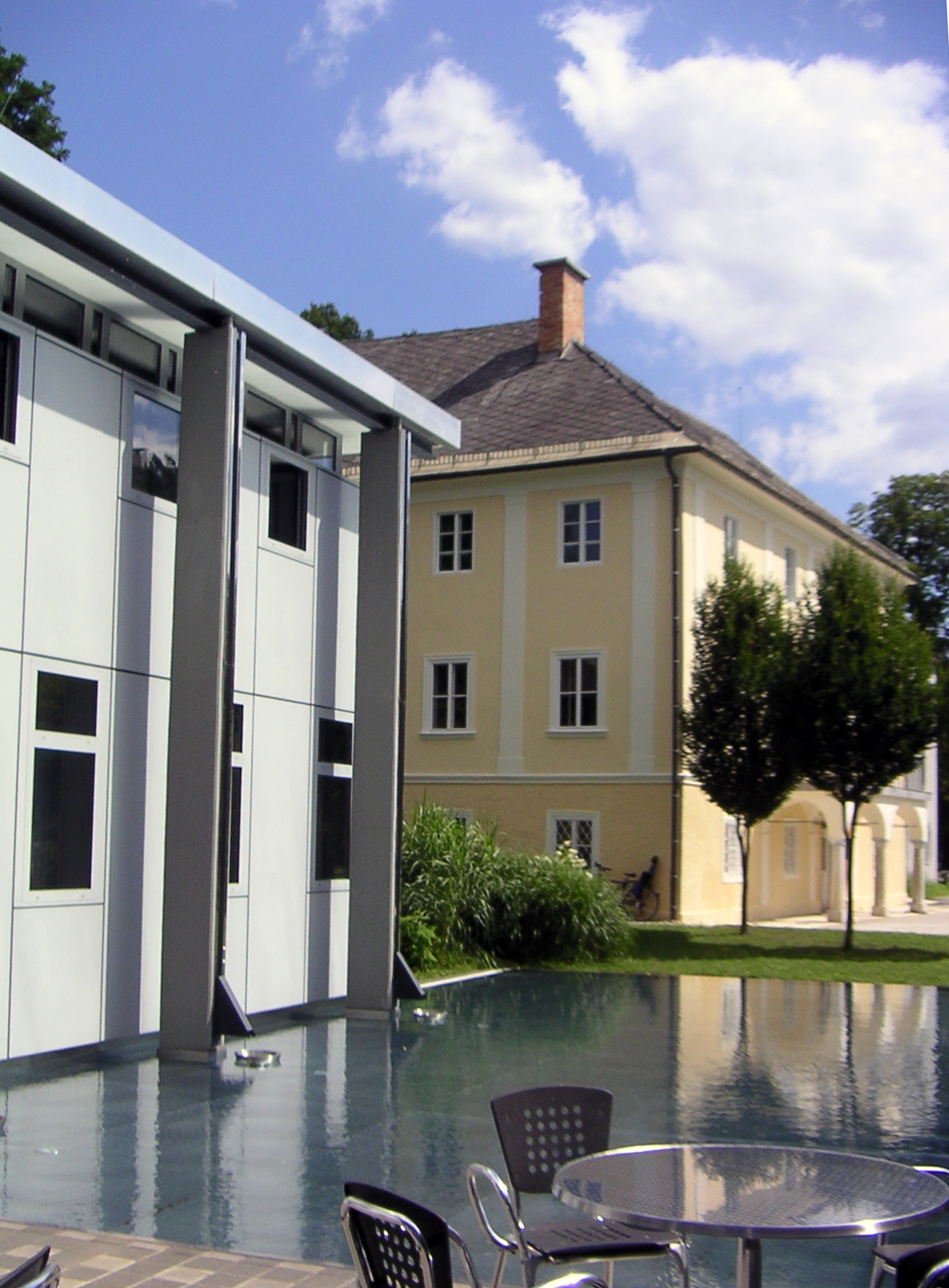 Kärntner Landesarchiv, Blick über die Wasserflächen, fotografiert von Benutzer:Binter first uploaded on de-WP: 21:57, 5. Aug 2005 Benutzer:Binter